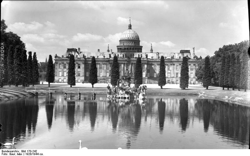 Potsdam.- Stadtschloß